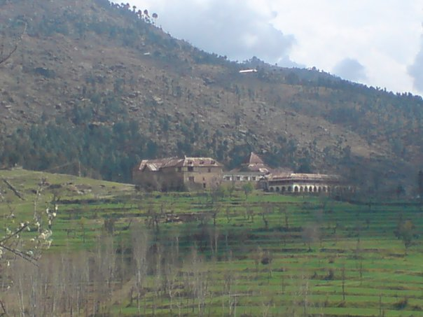 Mansehra